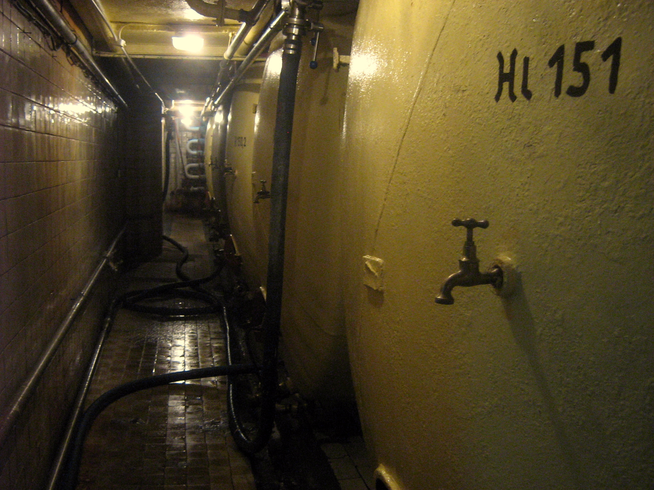 Piwnica leżakowa w 2010 r. - 63 tanki leżakowe o łącznej pojemności ok. 9 tys hl